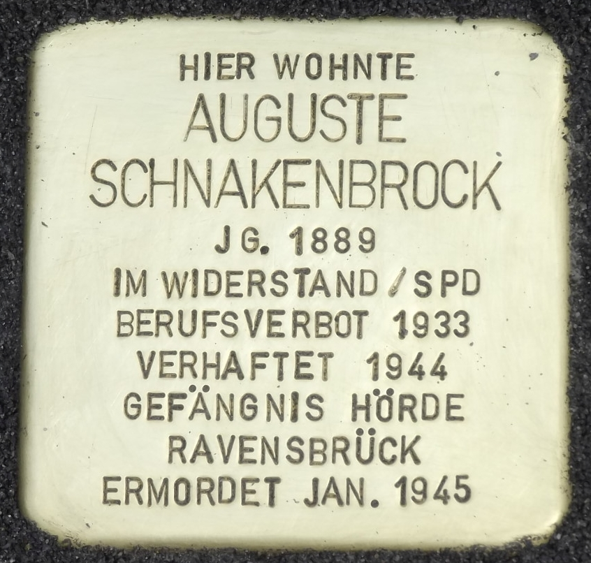 Stolperstein seit 2014 in Lünen, Horstmarer Str. 30, für Auguste Schnakenbrock